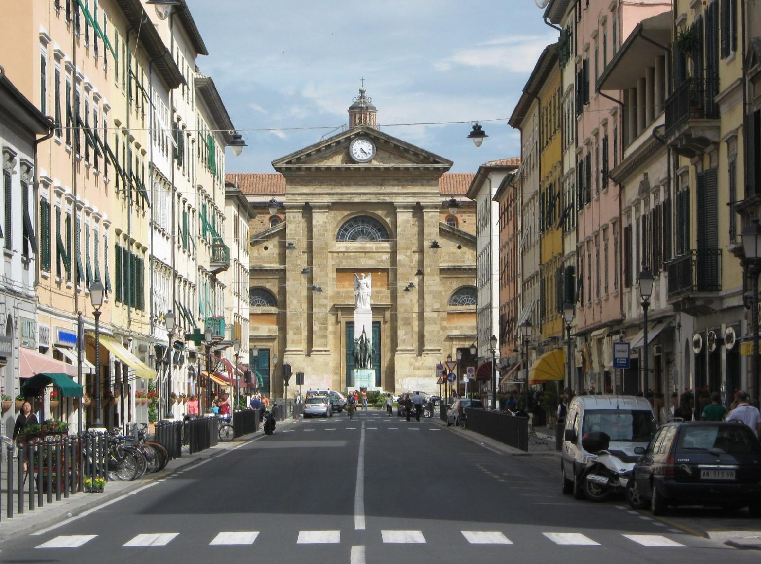 Livorno: l'imponente chiesa del Soccorso vista da Via Magenta.